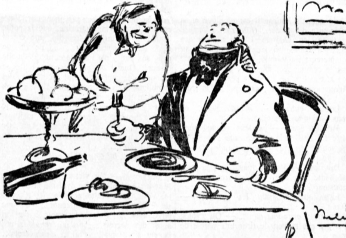 Adele pidou vraie paysanne dans Comœdia 24 mai 1924